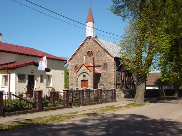 Redło - kościół p.w. Narodzenia św. Jana Chrzciciela, 1859, neoromański